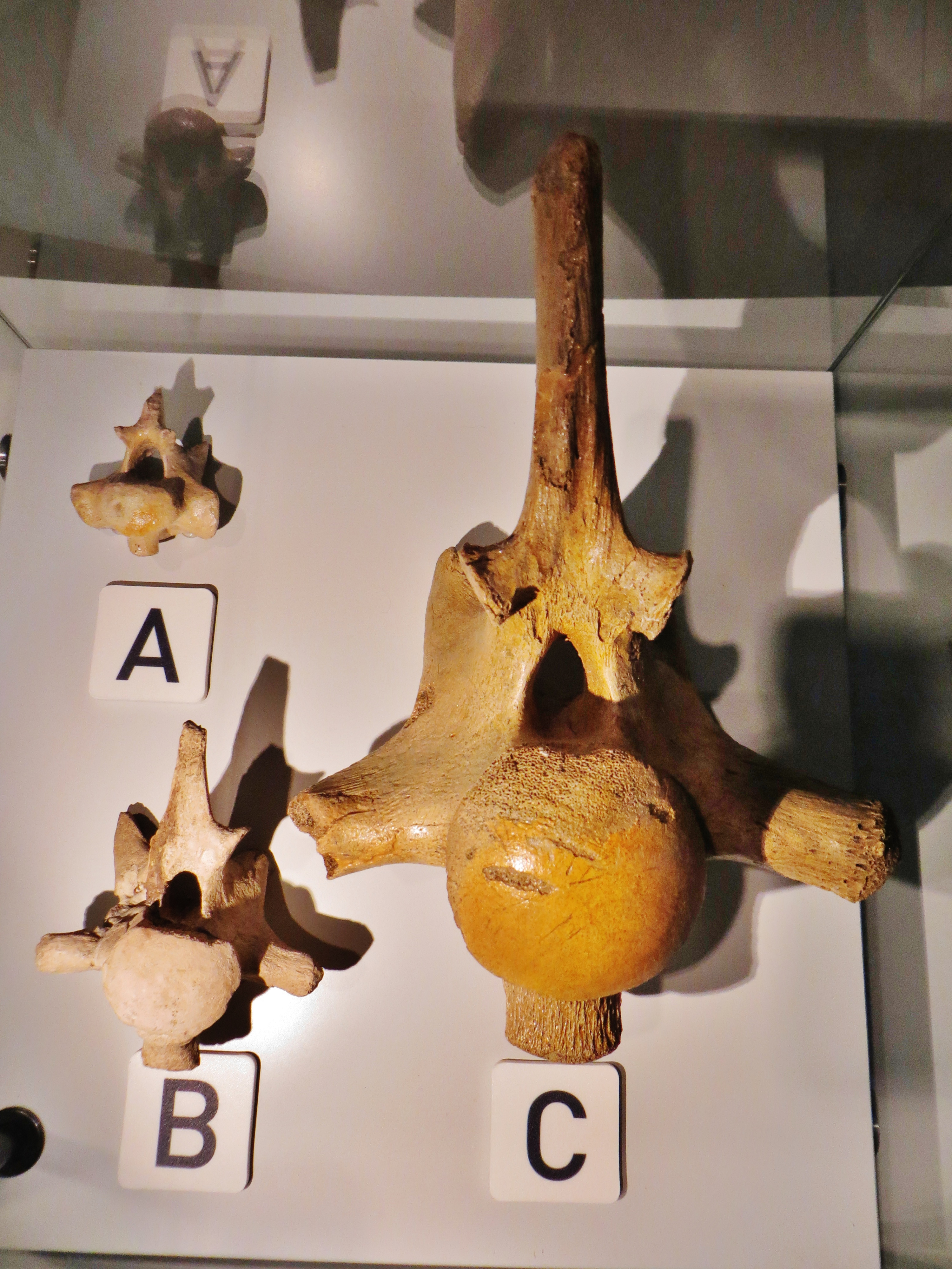 Fossil - Took The picture at Royal Belgian Institute of Natural Sciences, Brussels